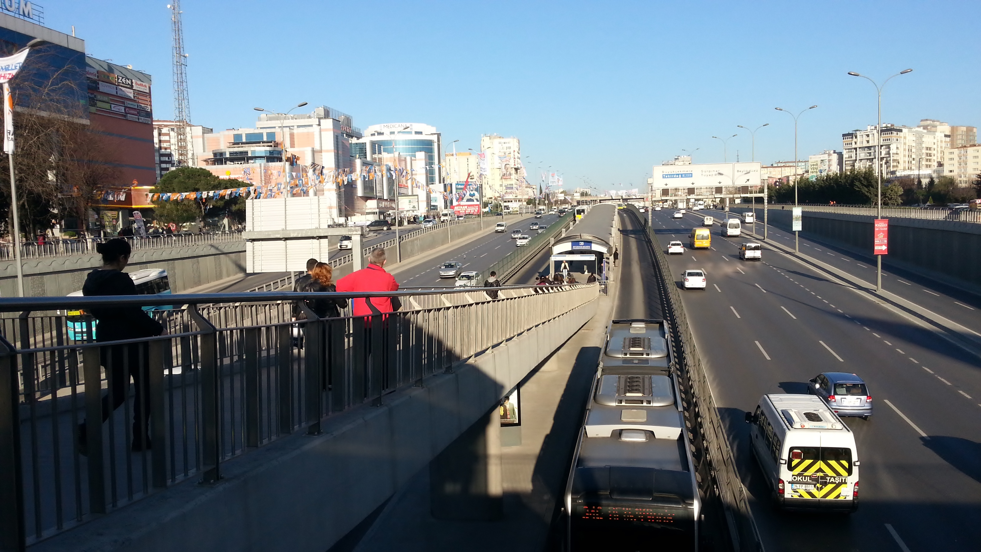 Beylikdüzü Belediye Metrobüs İstasyonu / Beylikdüzü Özgürlük Meydanı İstasyonu